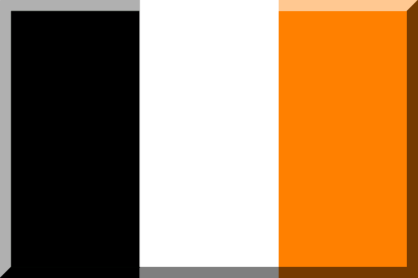 Nero Bianco e Arancione